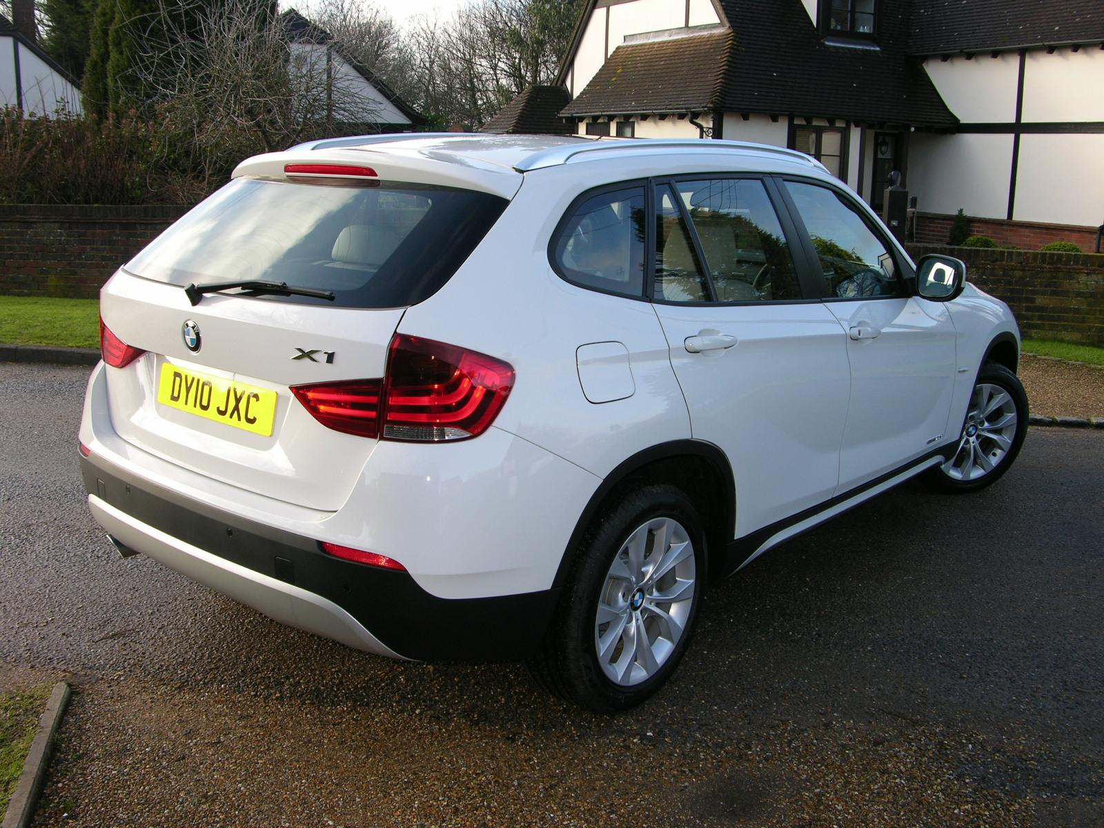 2010 BMW X1 sDrive 2.0d SE